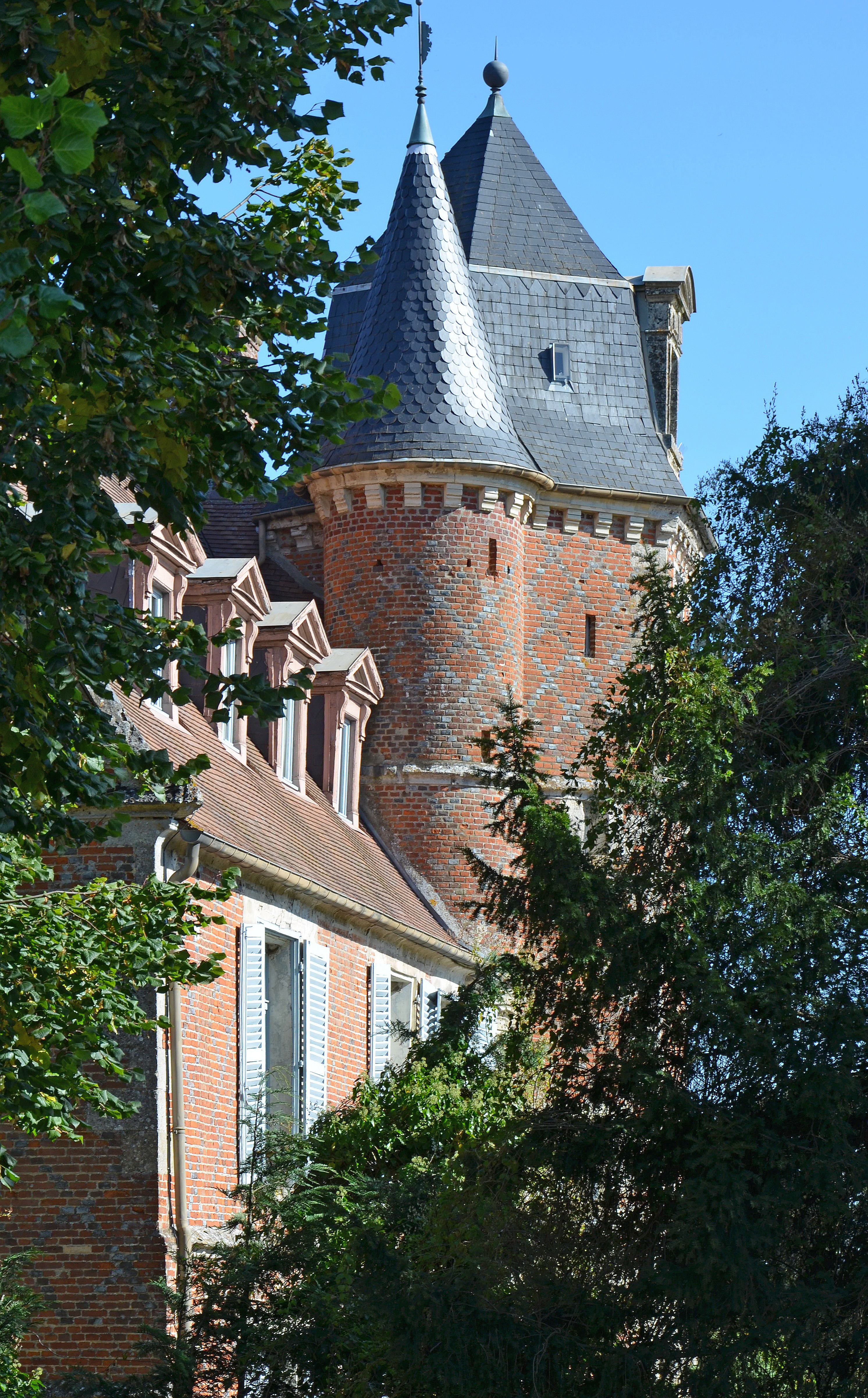 Château d'Oigny-en-Valois, Aisne, France .